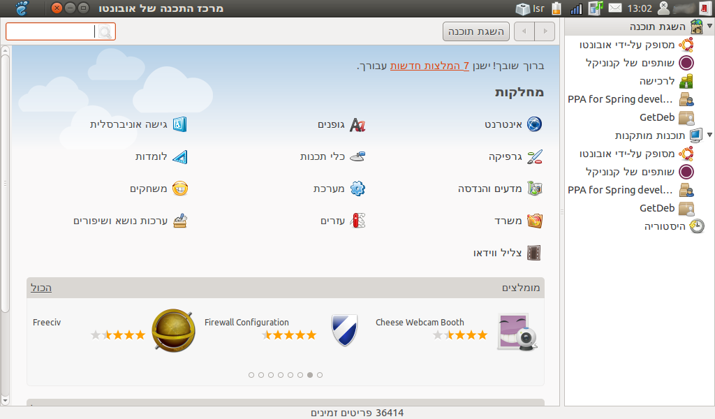 מסך הפתיחה של מרכז התוכנה